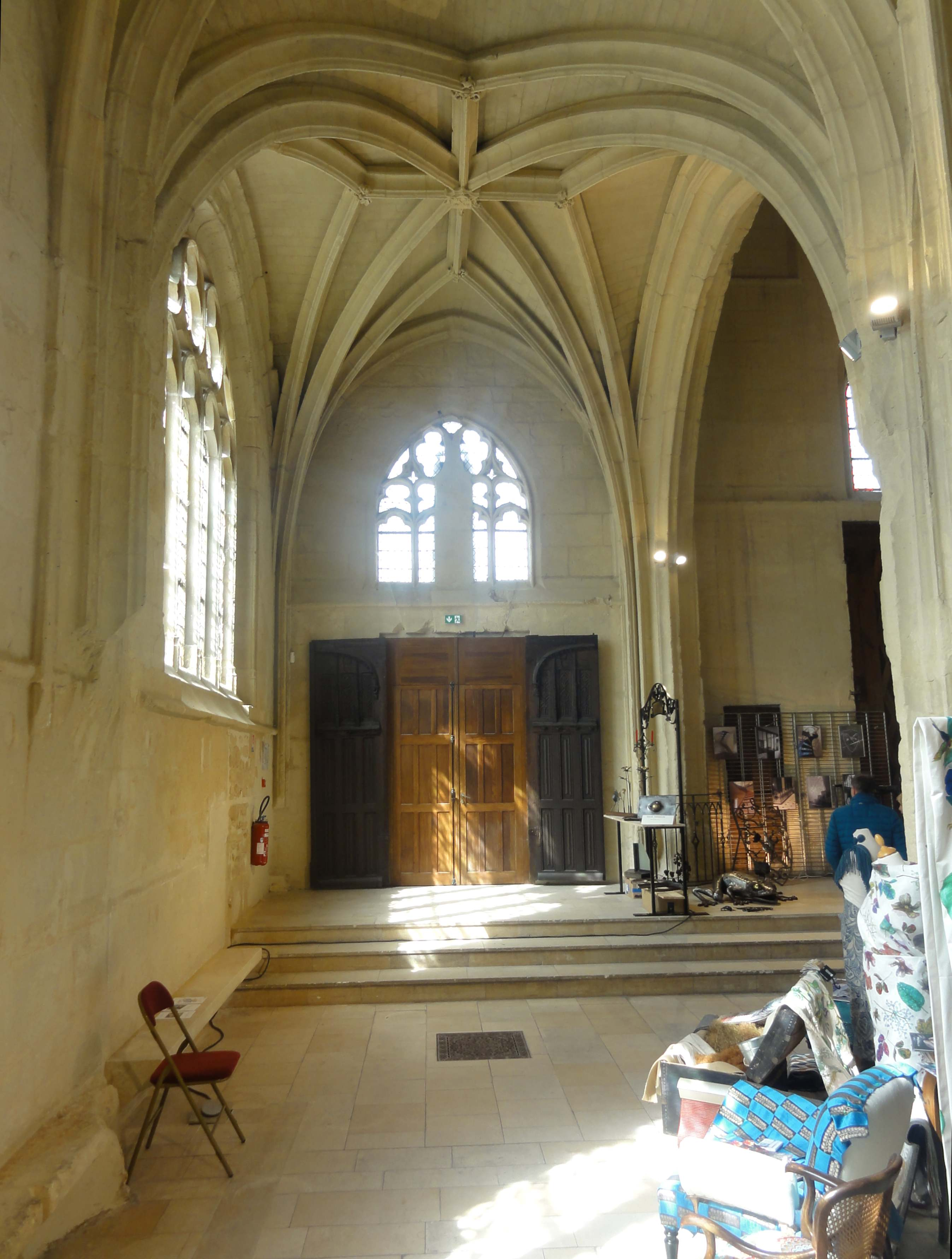 Intérieur de l'église - voir titre.